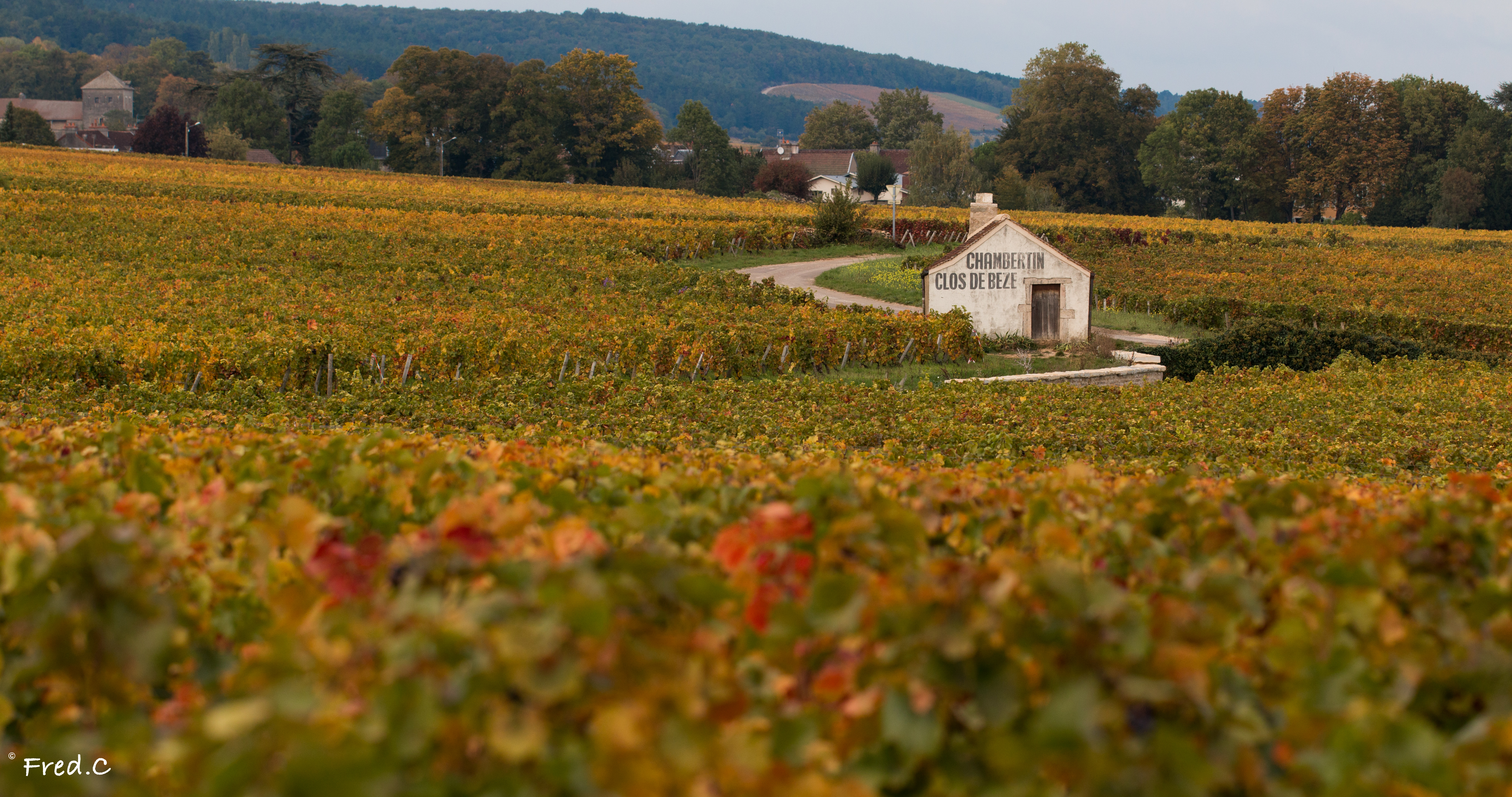 Debut de l'automne